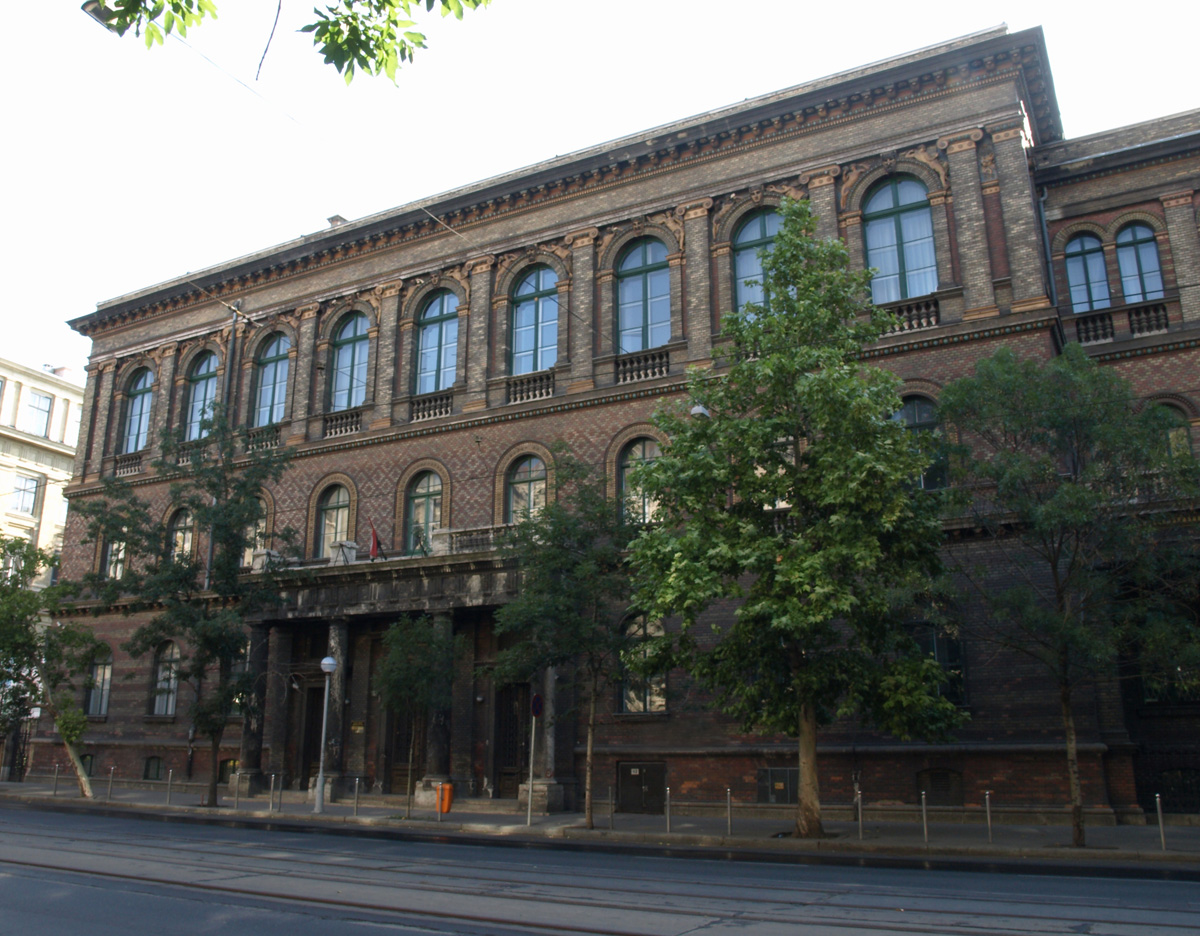 Budapest, ELTE Bölcsészettudományi Kar, Múzeum körút 4-8. This is a photo of a monument in Hungary, Identifier: 944 Kategória:budapest